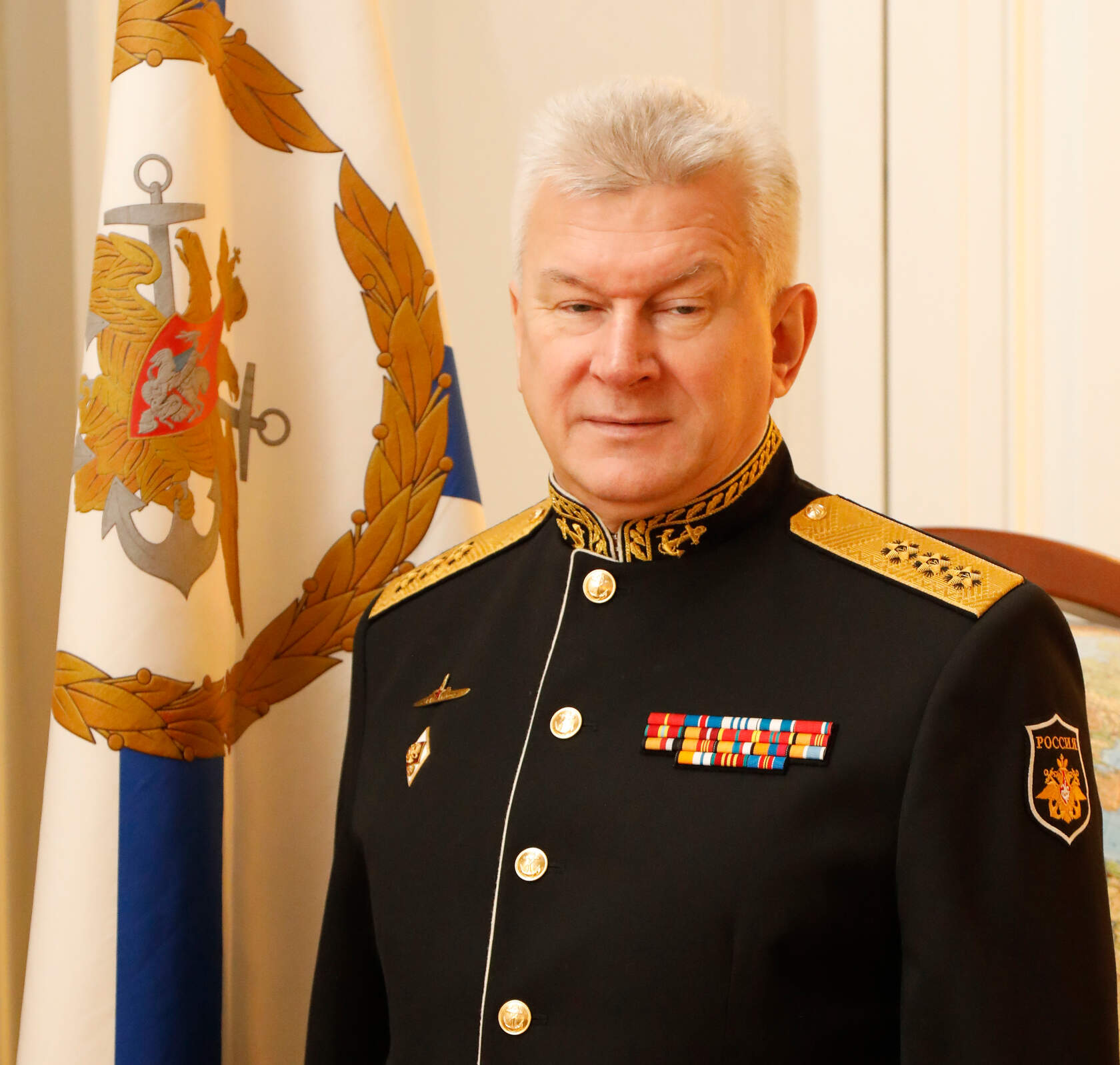 Главнокомандующий Военно-Морским Флотом Российской Федерации адмирал Евменов Николай Анатольевич